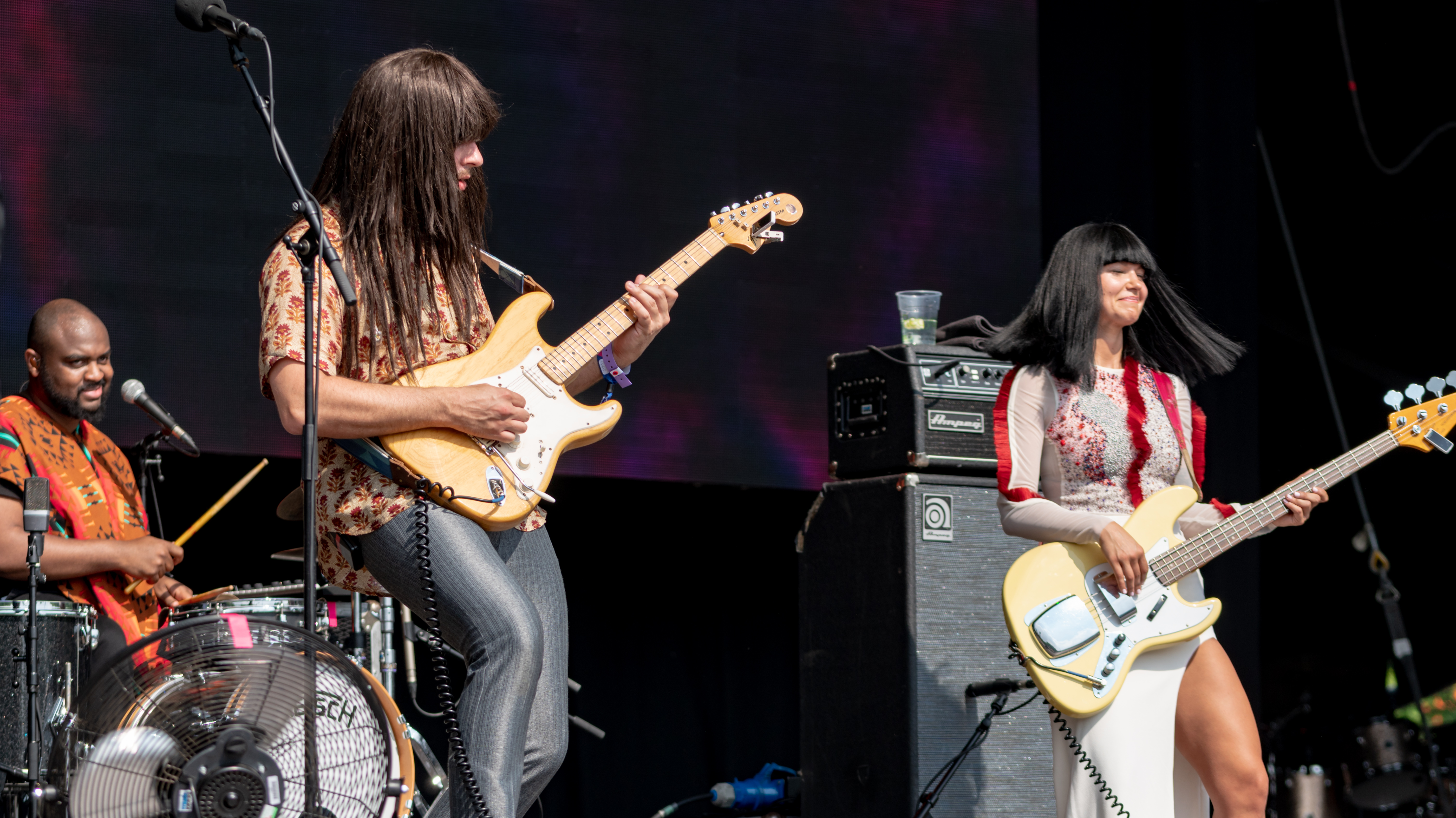 APEVicPark270518-29